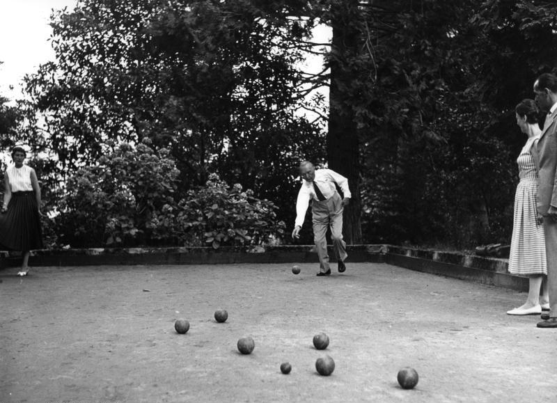 Bundeskanzler Konrad Adenauer mit seiner Familie beim Bocciaspiel in Cadenabbia am 30.8.1958